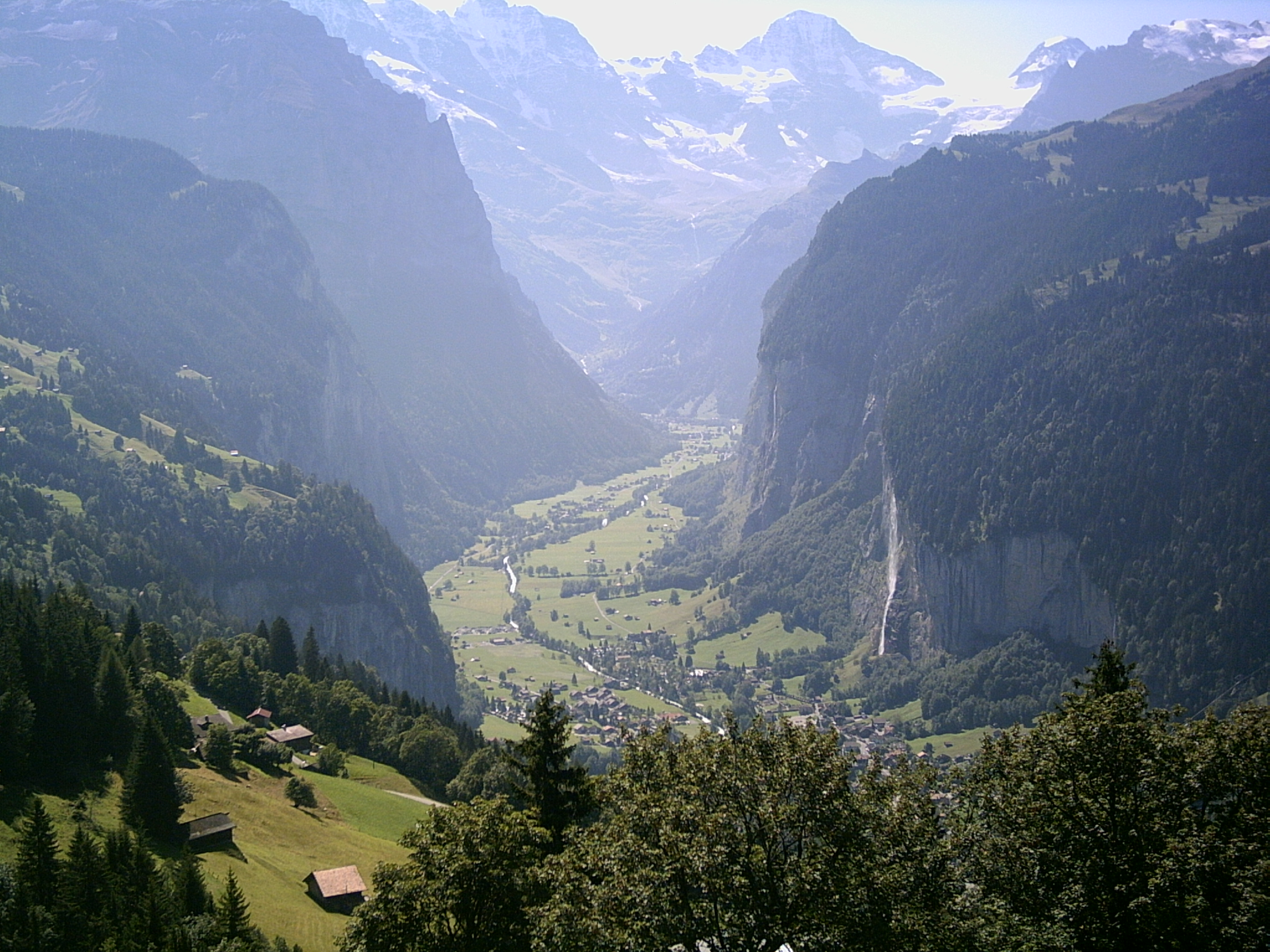 Lauterbrunnental von Wengen aus Richtung Stechelberg